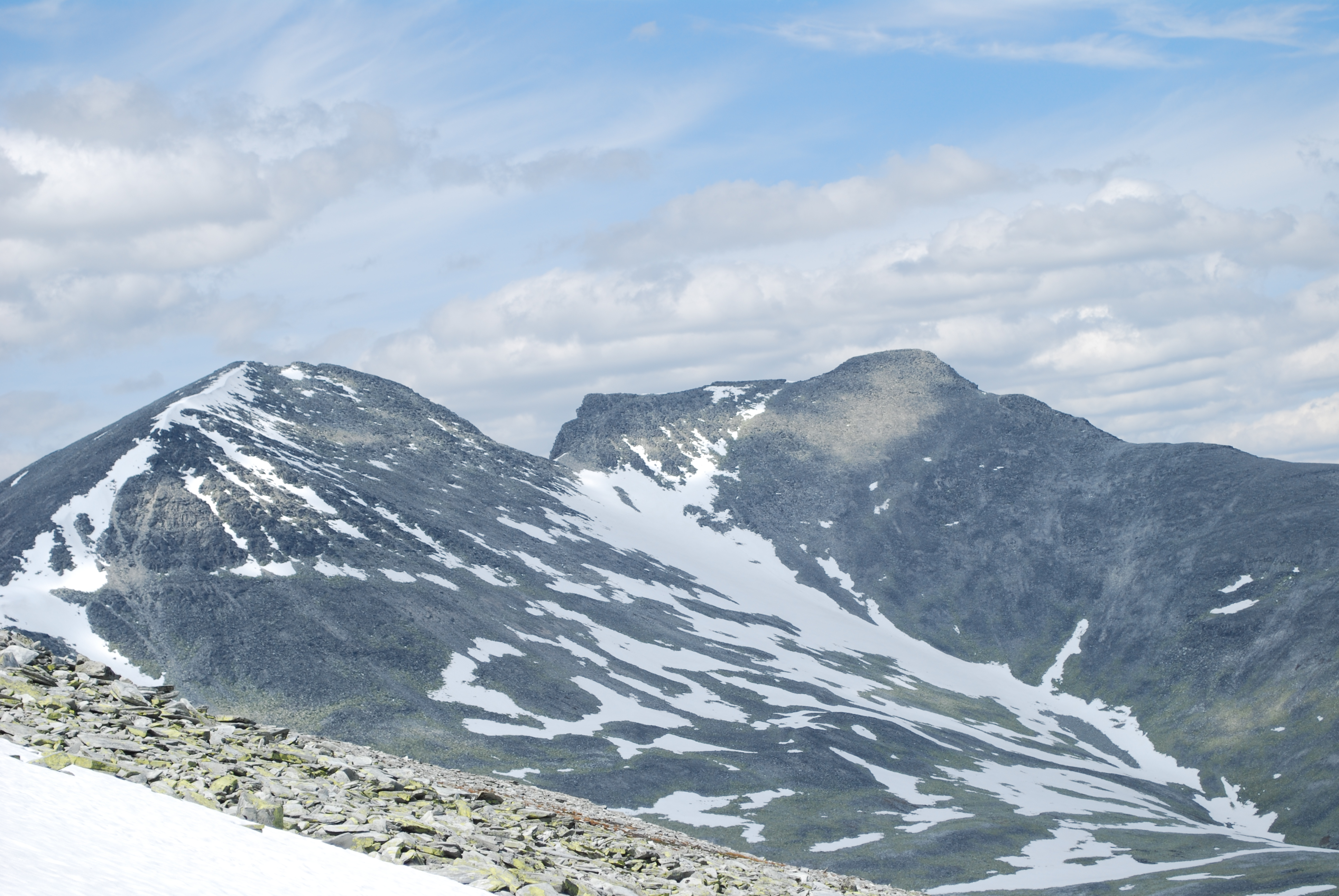 Vestre Midtronden (2060 moh) og Austre Midtronden (2042 moh) sett fra fjellsiden av Rondslottet (2178 moh).